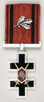 Орден Креста Витязя